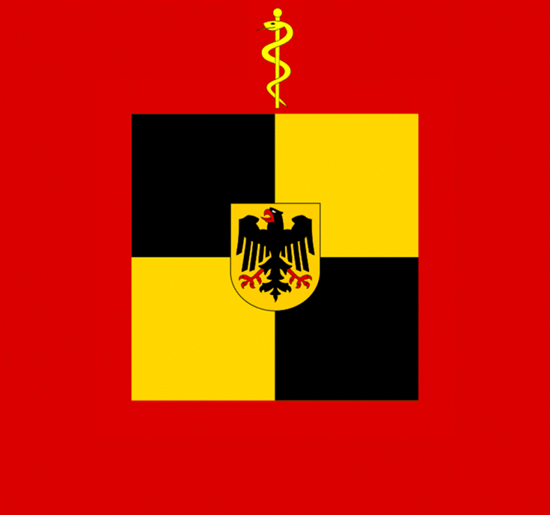 Kfz-Stander des Inspekteurs des Sanitätsdienstes der Bundeswehr.